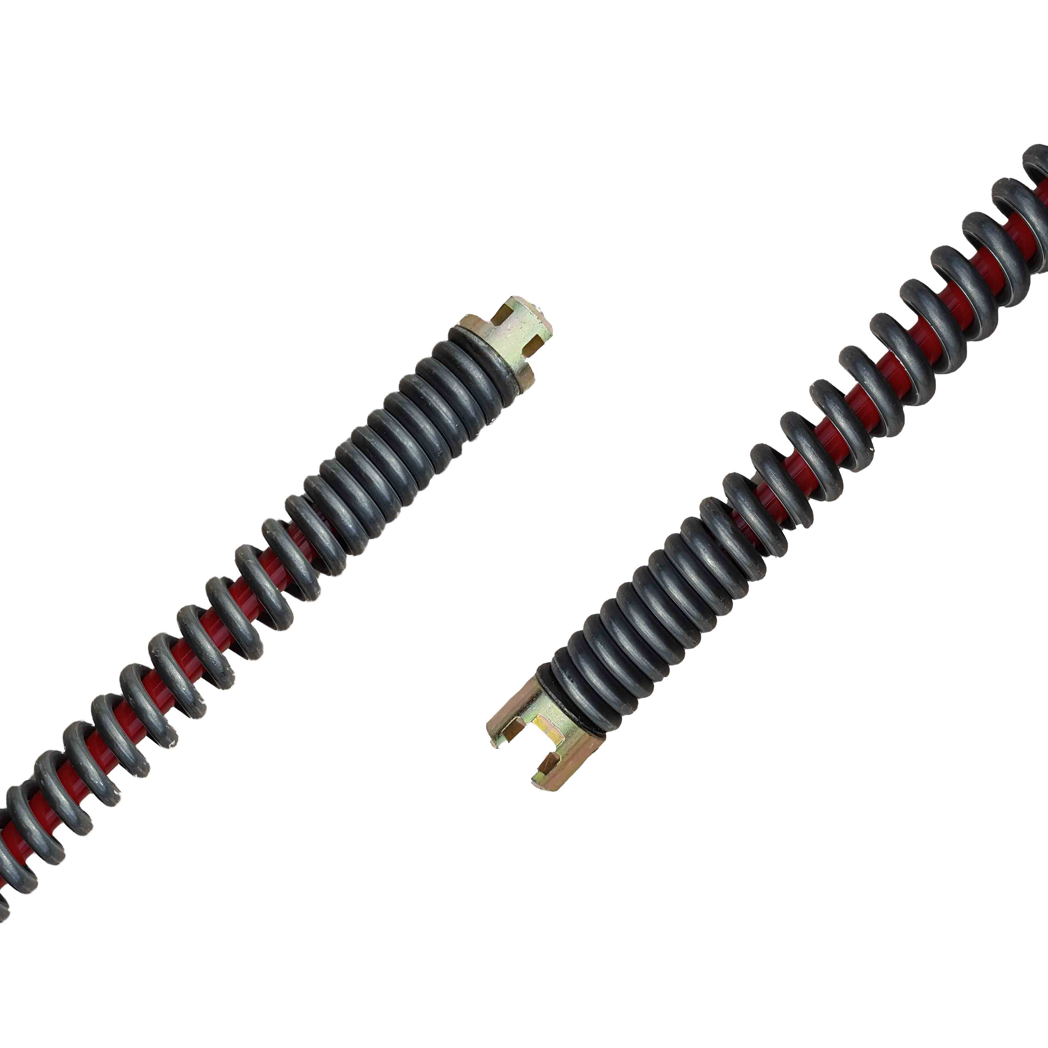 Profi-Rohrreinigungsspirale mit T-Nut-Kupplung